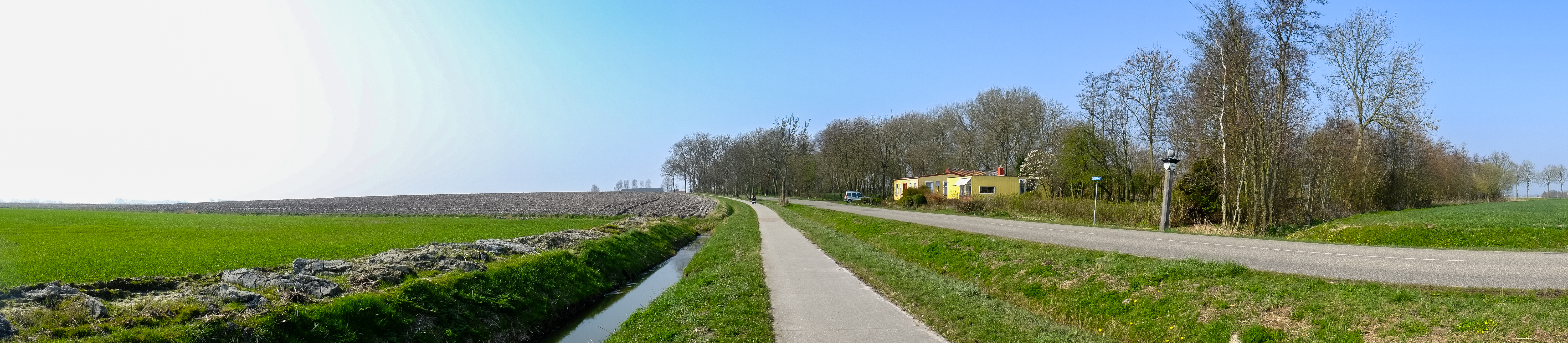 Panorama over de wierde Grote Houw vanuit het oosten